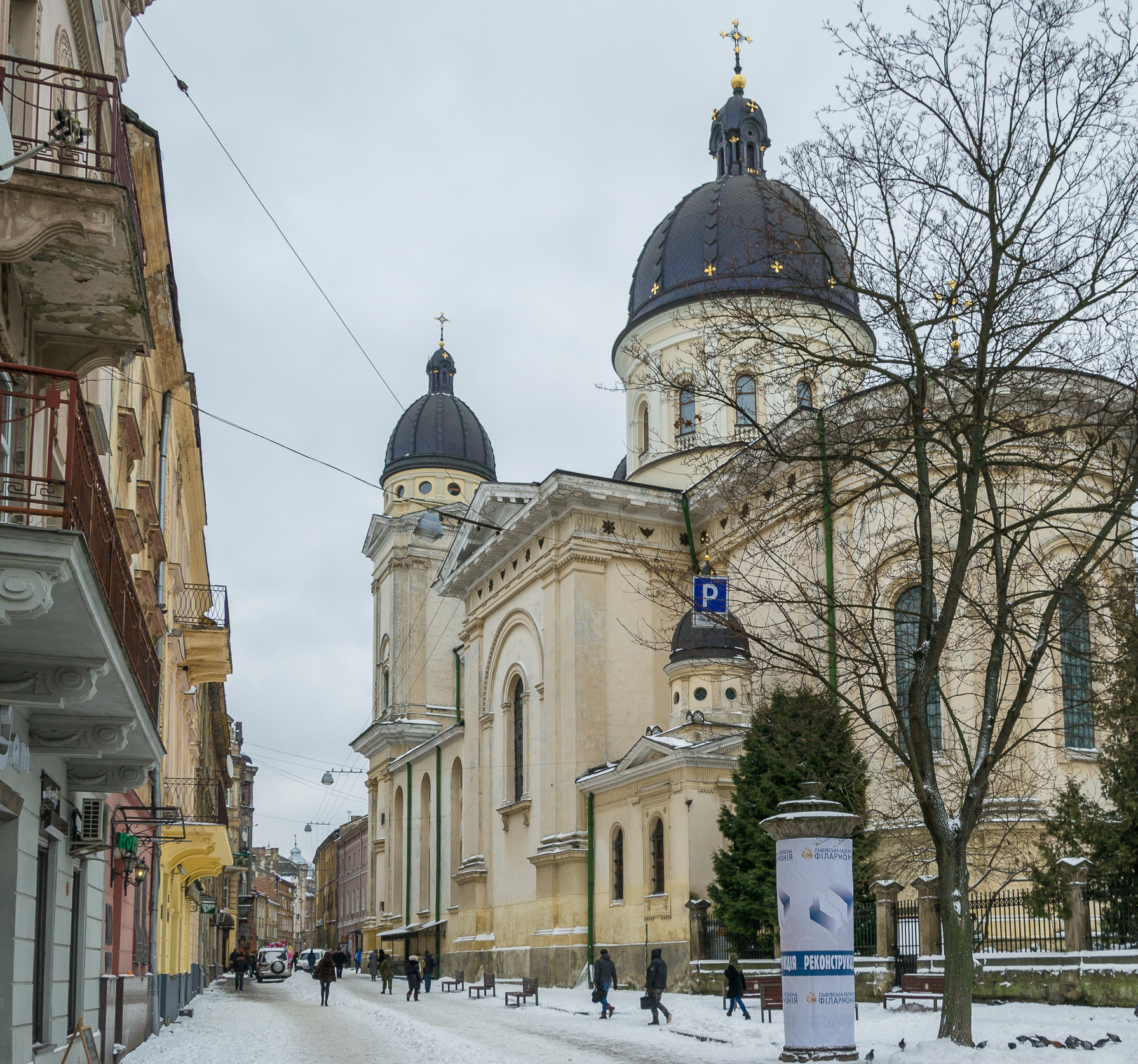 церква Преображенська, Львів, Краківська, 21